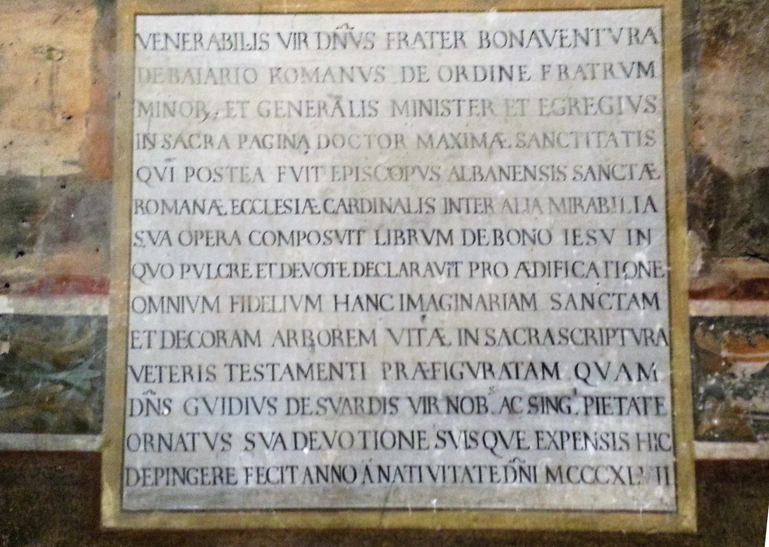 Epigrafe Albero della Vita, opera del Maestro dell'Albero della vita